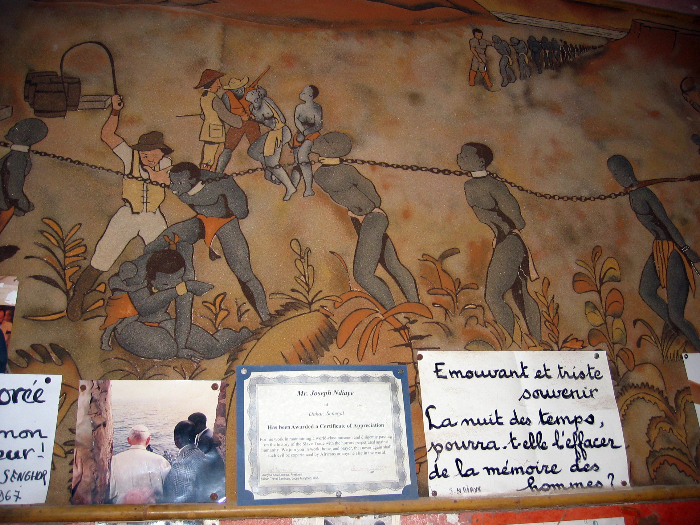 Fresque, photos, citations et diplôme décerné à Joseph Ndiaye, à la Maison des Esclaves de l'île de Gorée (Sénégal)